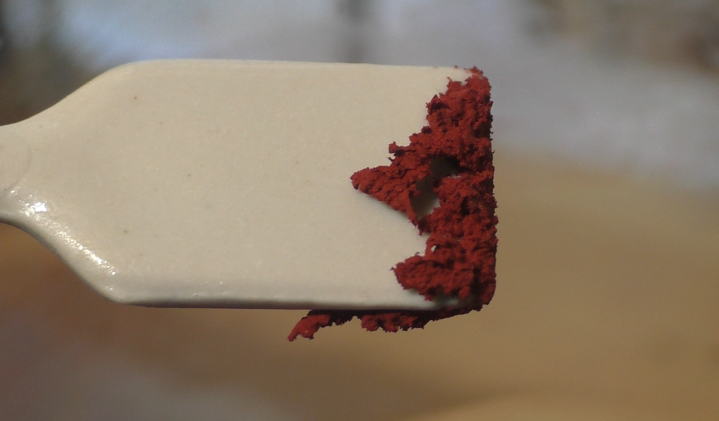 Порошок красителя аурина